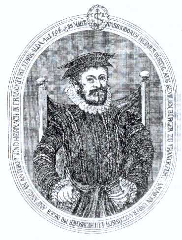 Casiodoro de Reina de Proel En el dominio público por antigüedad ¿Por qué? En el origen no se menciona autor ni fecha. Esta imagen proviene de Promotora Española de Lingüística Se trata de material de dominio público.